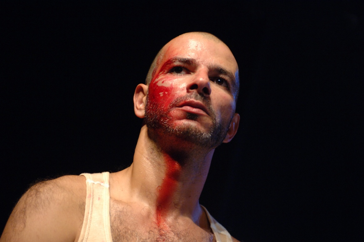 יוסי עיני כיאגו מתוך אותלו